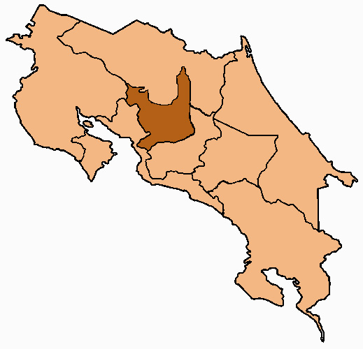 Mappa della diocesi di Alajuela, in Costa Rica. Lavoro personale, eseguito a partire da questa immagine di Commons. Fonte per i confini delle diocesi